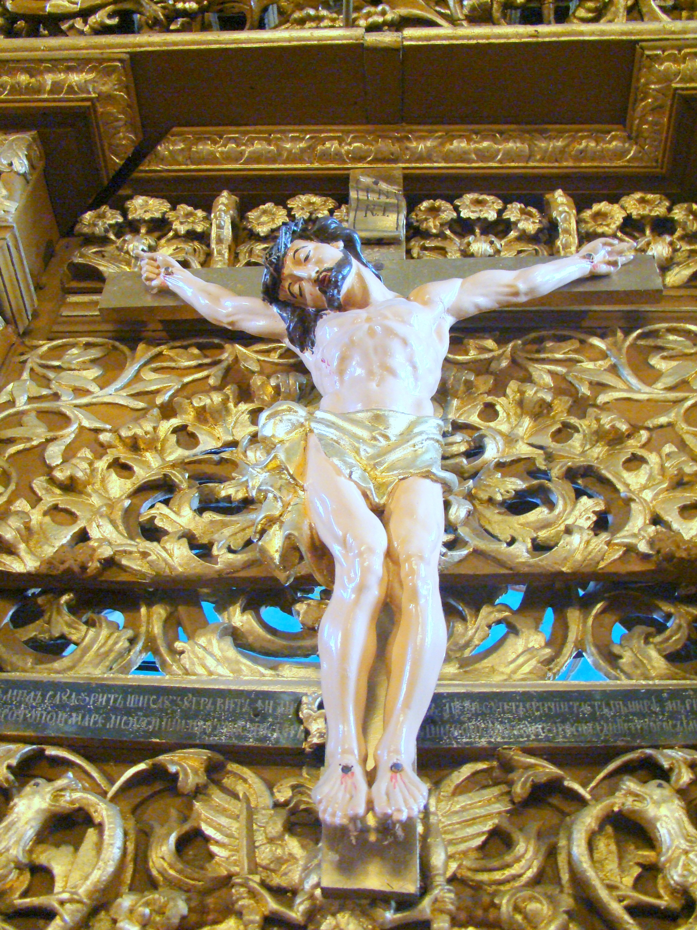 Biserica ortodoxă „Sf. Arhangheli Mihail și Gavriil”, sat Vadu Crișului; comuna Vadu Crișului